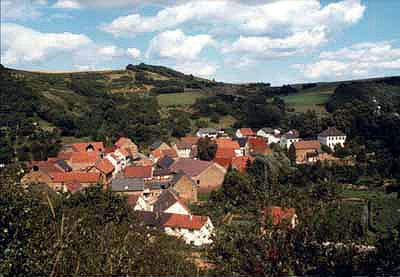 Ortsteil Finkenbach. LSDSL.